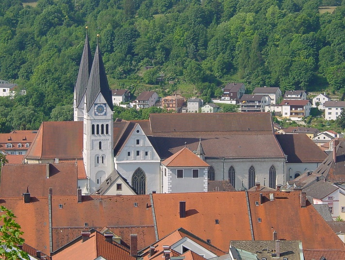 Dom zu Eichstätt